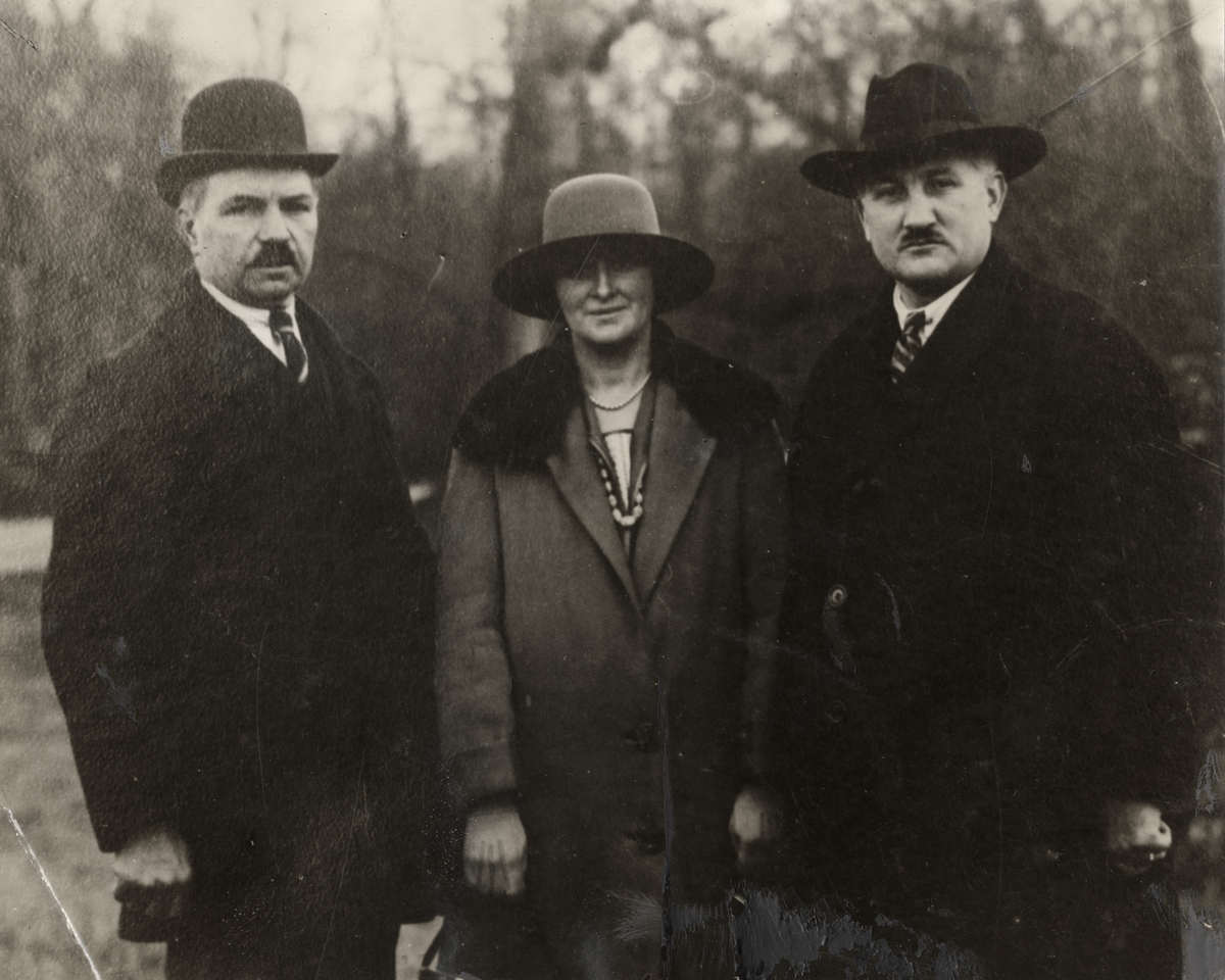 Leendert Arkenbout, diens vrouw en J.G. Maring